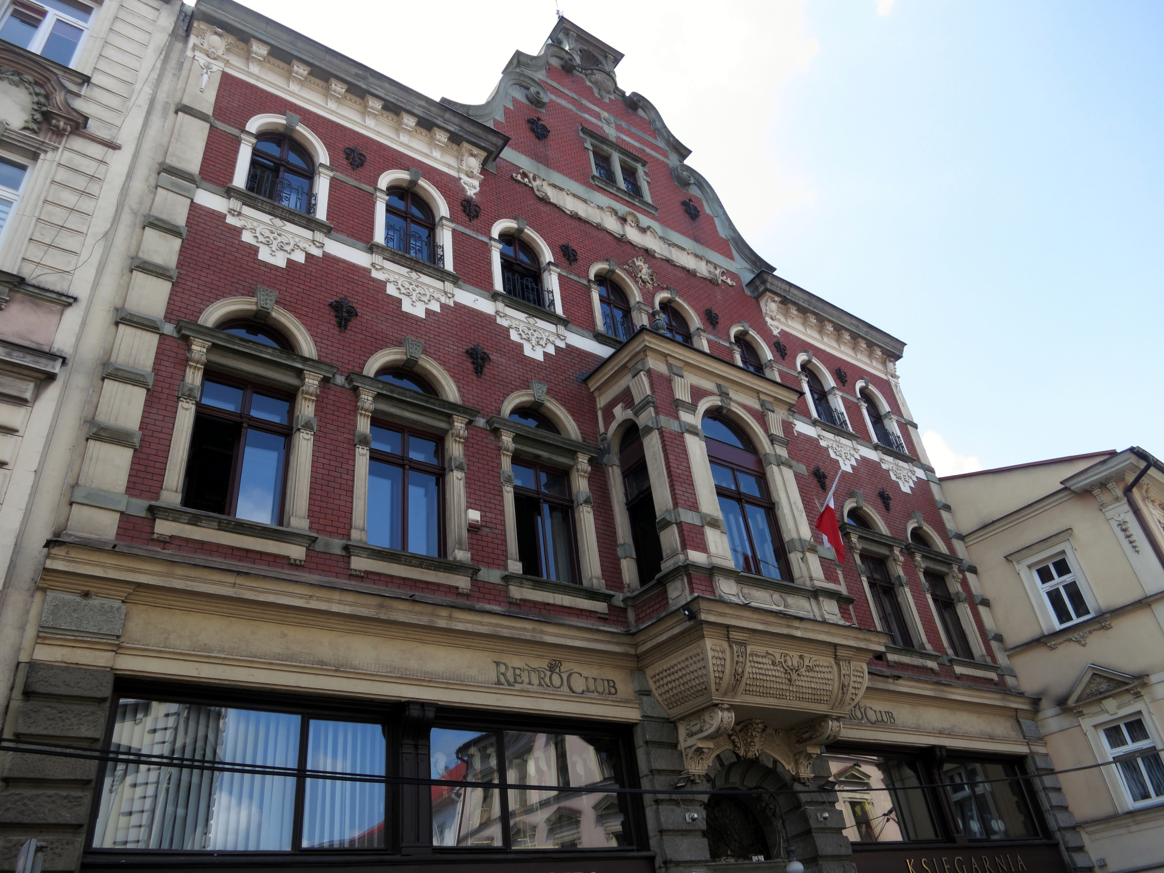 Cieszyn, D. Dom Niemiecki, kamienica Wikidata has entry Q30060368 with data related to this item.